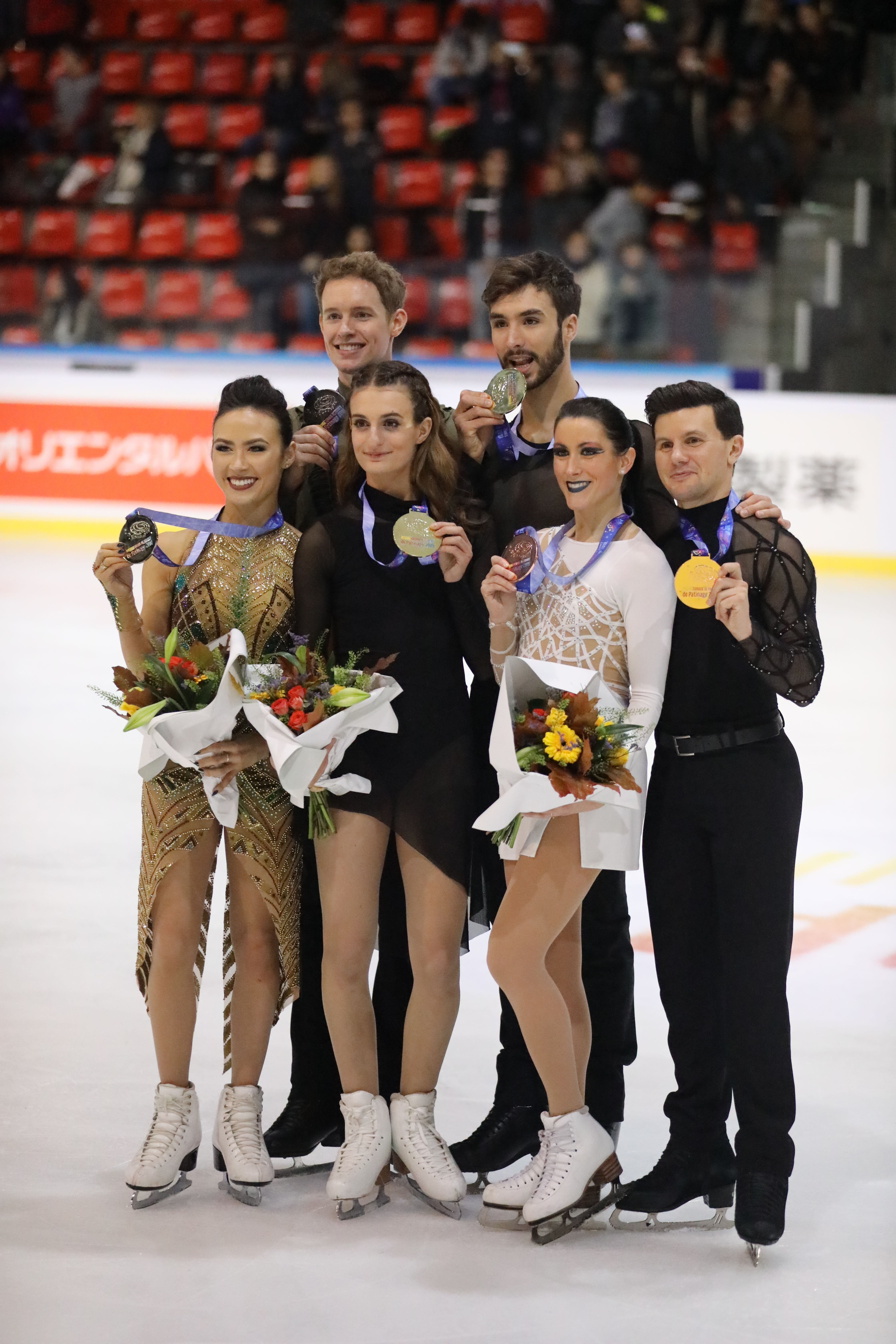 Médaillés en danse sur glace aux Internationaux de France 2019.